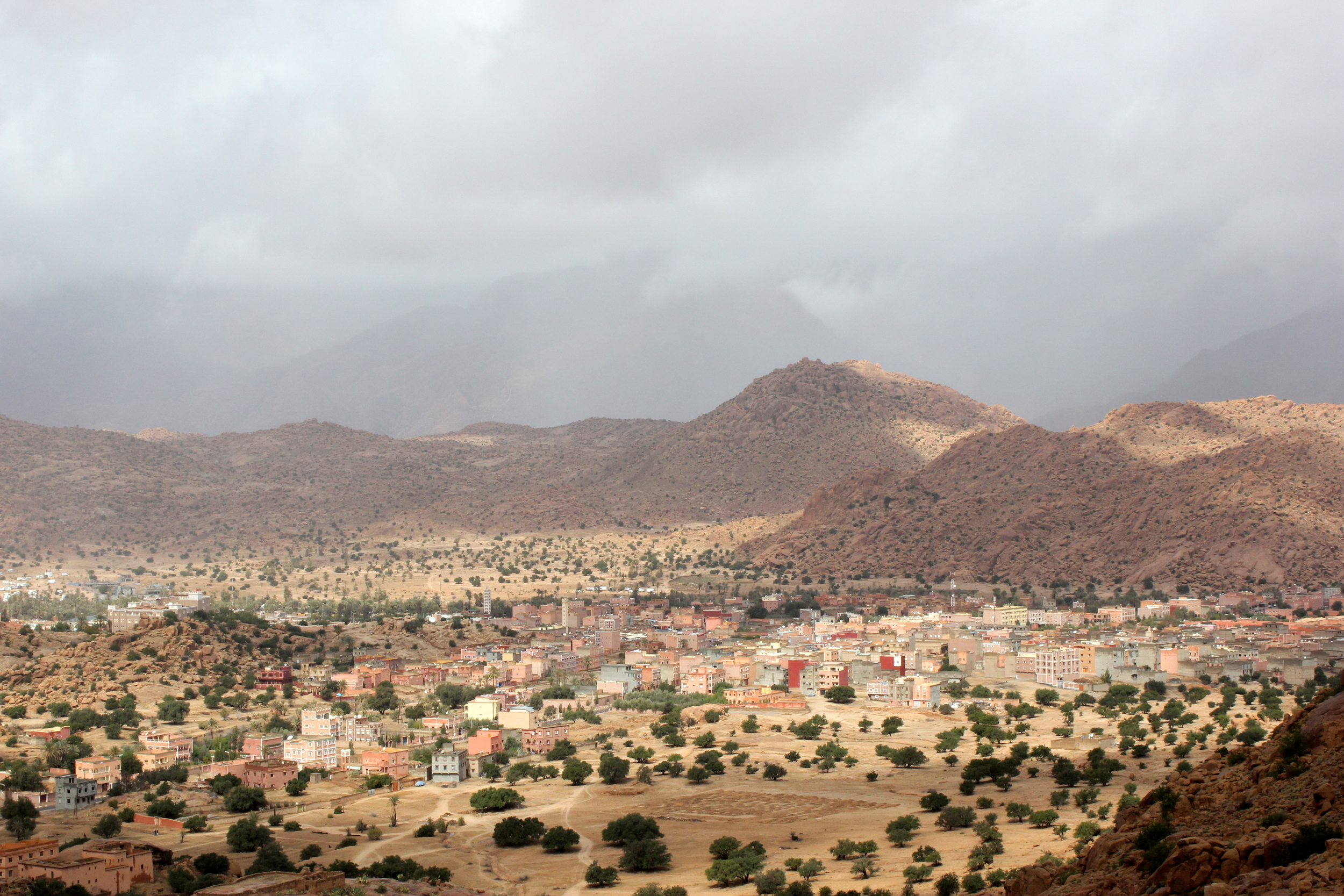 Blick über Tafraoute, Marokko.Hornjoserbsce: Napohlad města Tafraoute, Marokko.